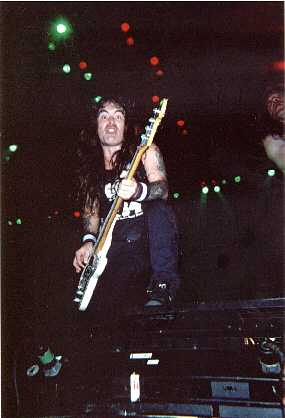 Bildbeschreibung: Steve Harris Fotograf/Zeichner: Robert Körner a.k.a. Maidenaustria Datum: 8.6.2003, Konzert in Wien Sonstiges: Up the Irons!